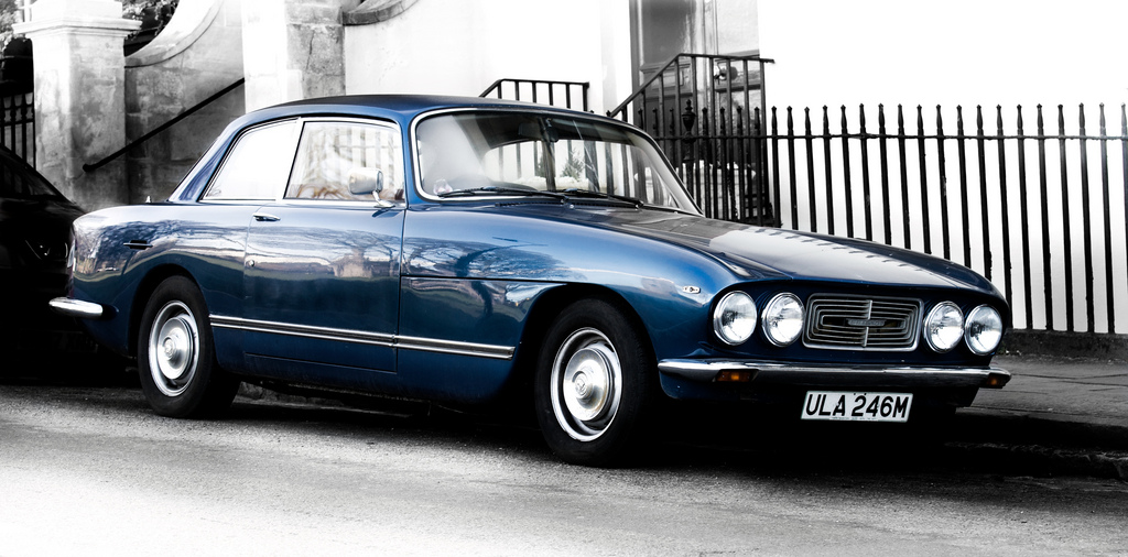 Bristol vehicles, model Bristol 411.